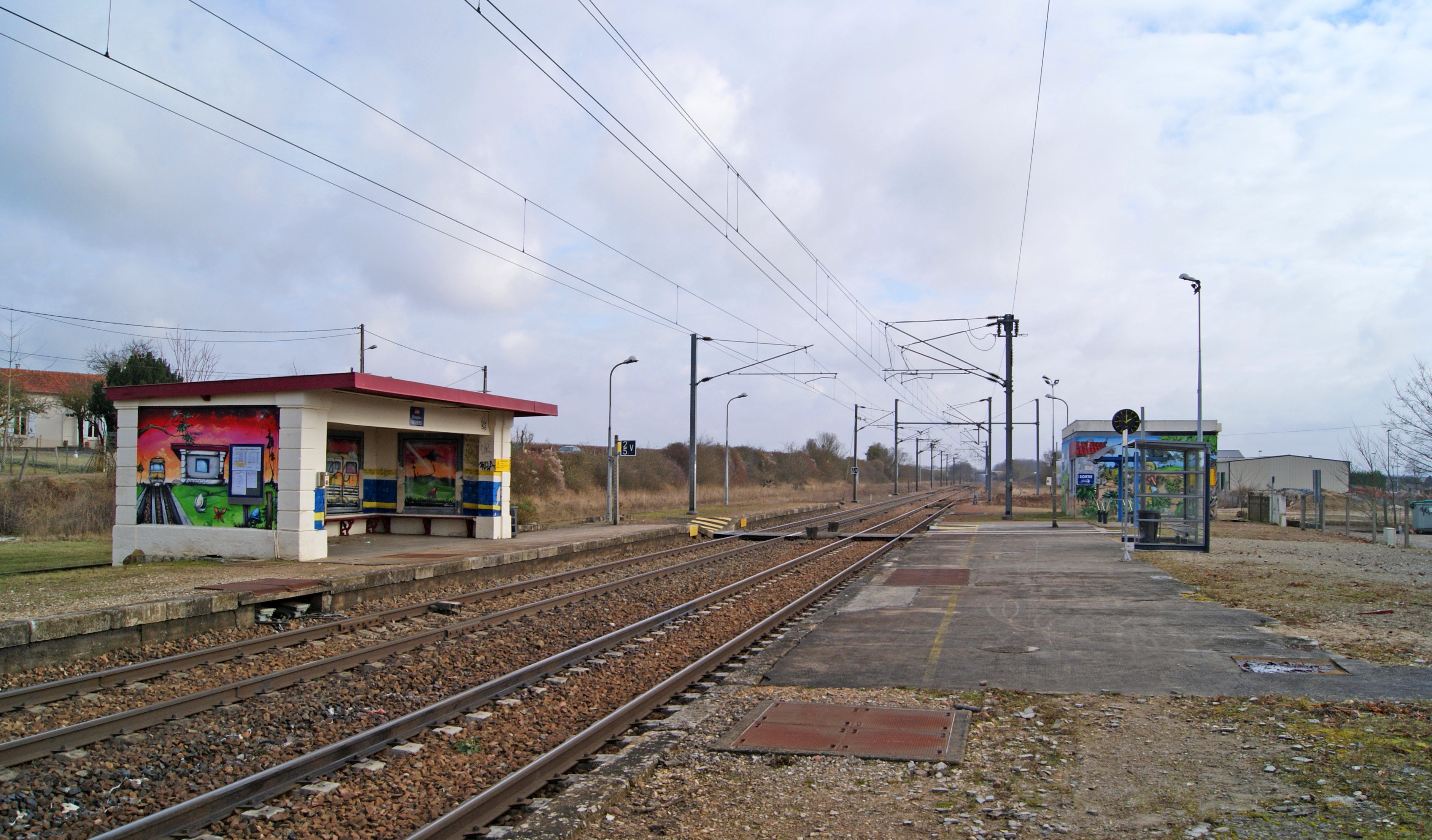 La gare de Pouilly sur Loire